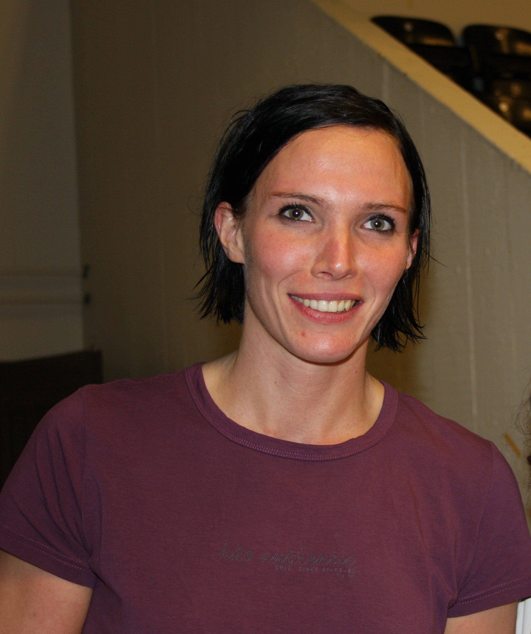 Photo match à Ikast